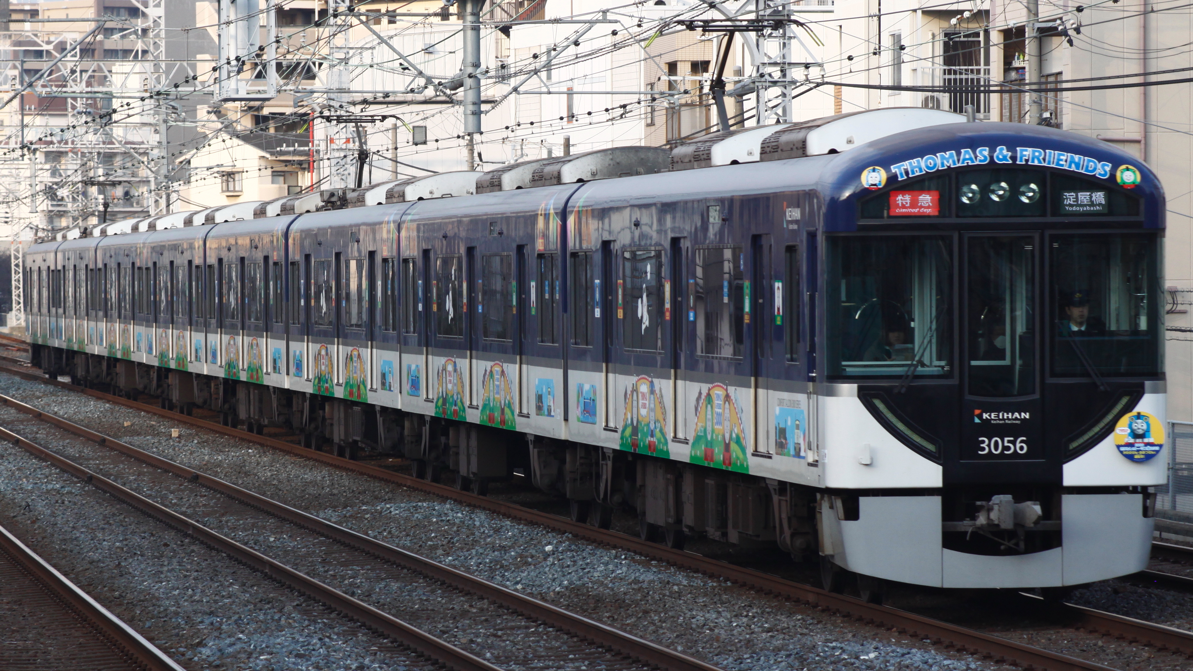 京阪3000系(2代) きかんしゃトーマスラッピング車